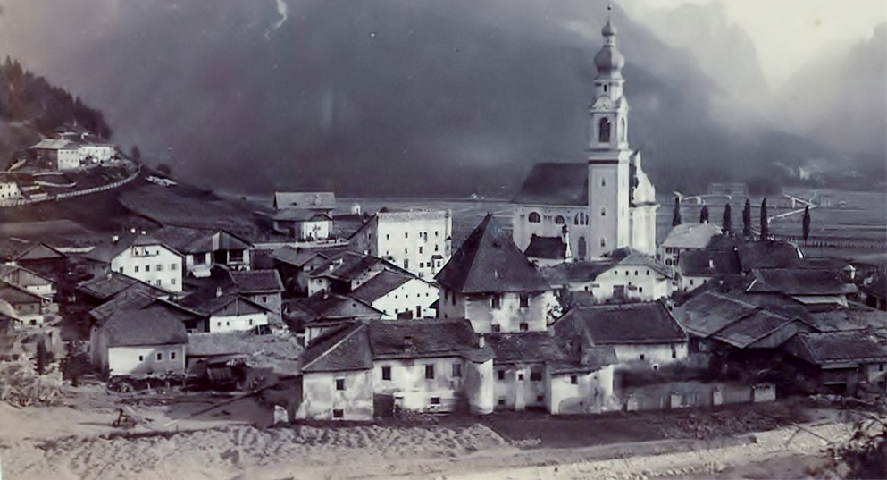 Dobbiaco post alluvione del 1882